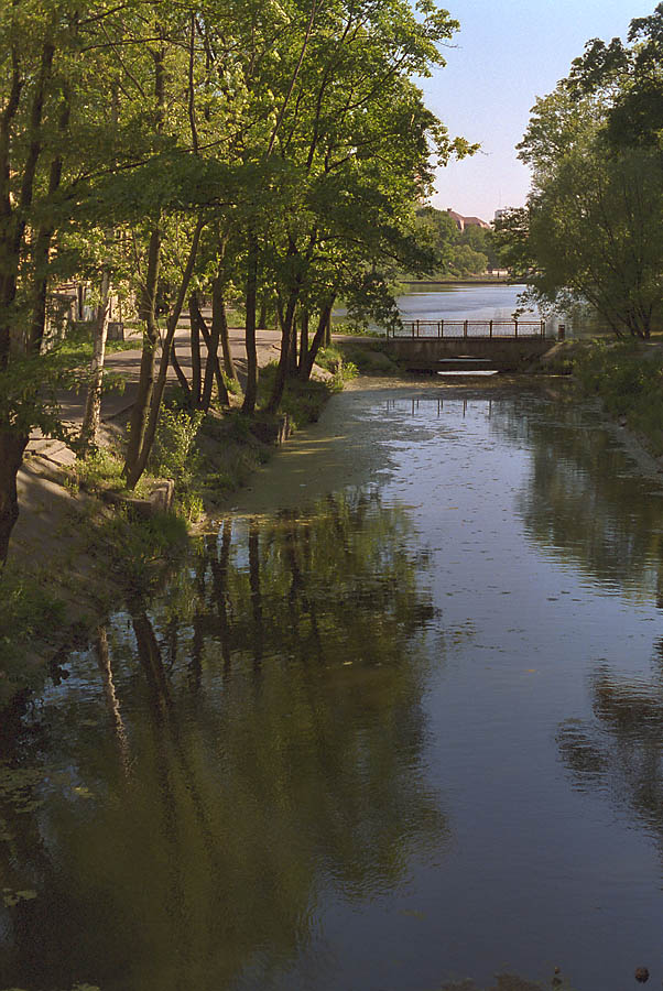 Royal ponds in Kaliningrad (2000)